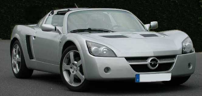 Speedster 2.2